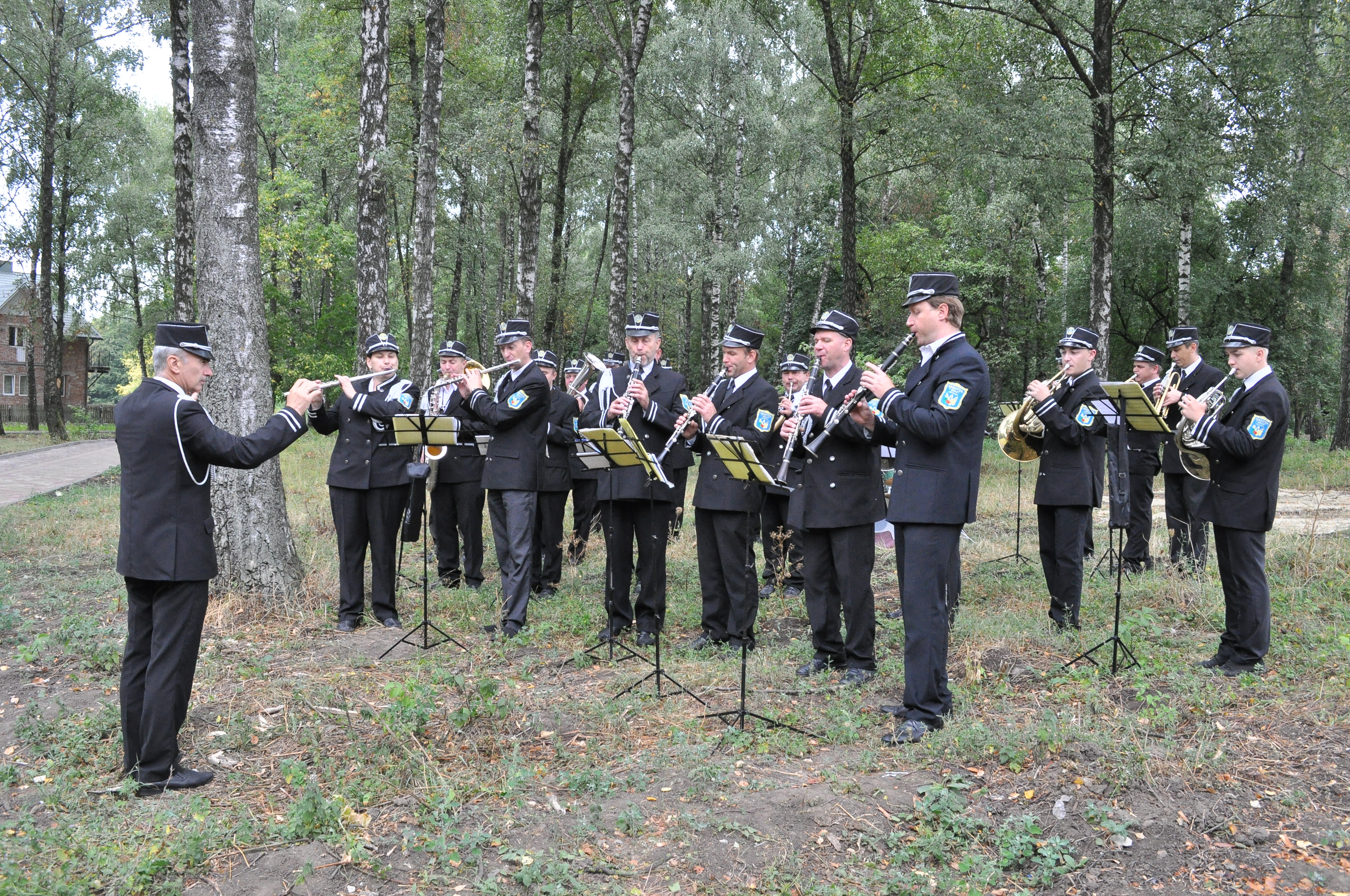 Відкриття Парк Здоров'я у Тернополі. Грає Оркестра Волі.